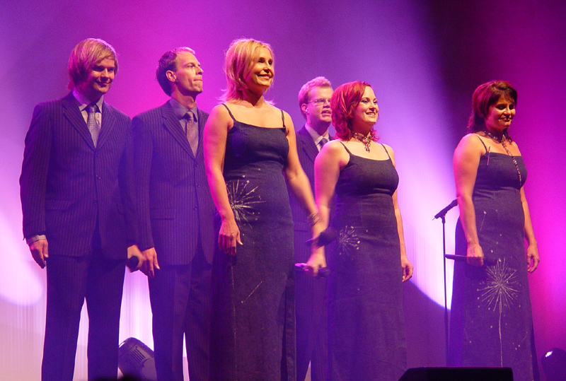 Rajaton, vocal jazz summit in Mainz